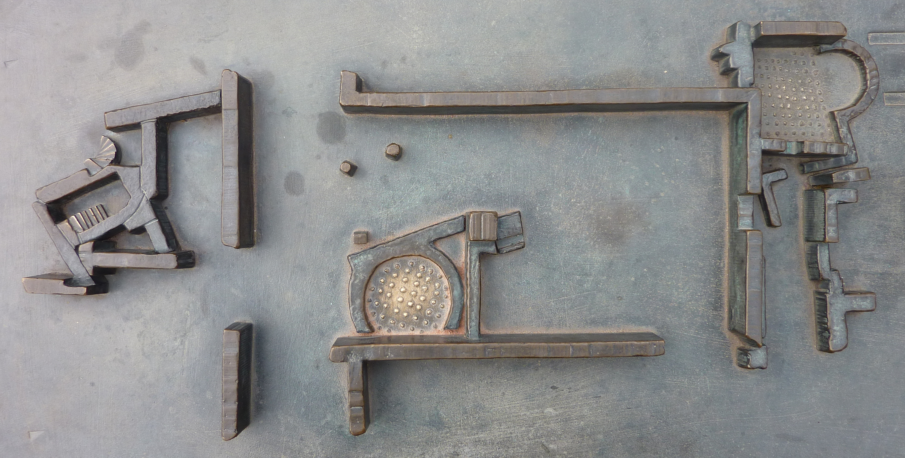 „Archäologischer Garten“, Frankfurt am Main: Bronzemodell der fränkischen Kaiserpfalz auf dem Domhügel aus dem 8. bis 11. Jahrhundert. Modell der archäologischen Funde vor Ort, Grundriss des Haupthauses (Draufsicht)